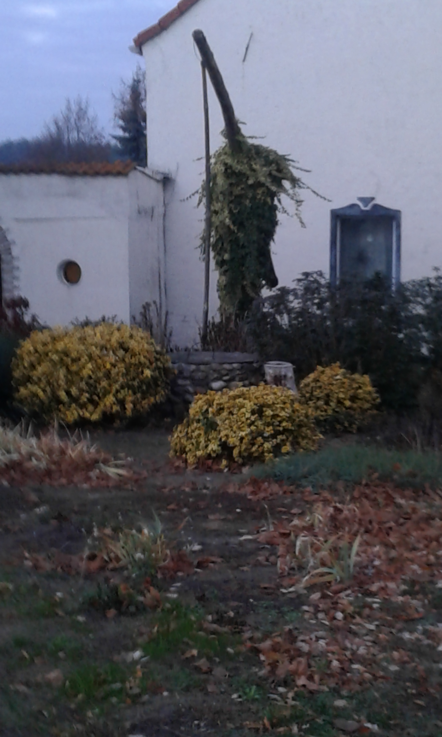 Brunnen